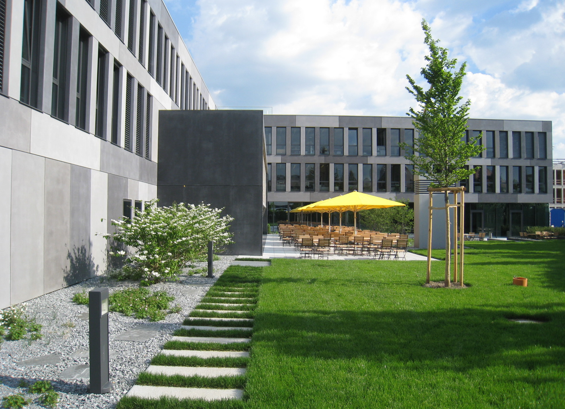 Wacker Neuson HV München